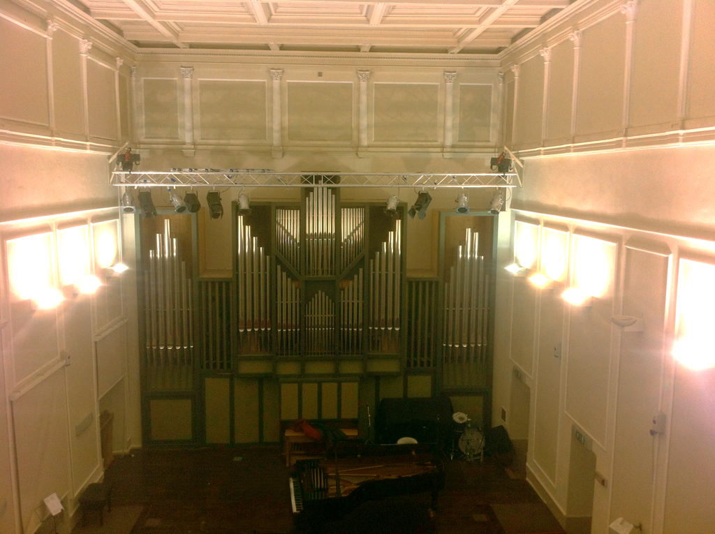 Interno e palco dell'Auditorium Pittaluga inaugurato nel 1997. Sul fondo l'organo Pinchi.